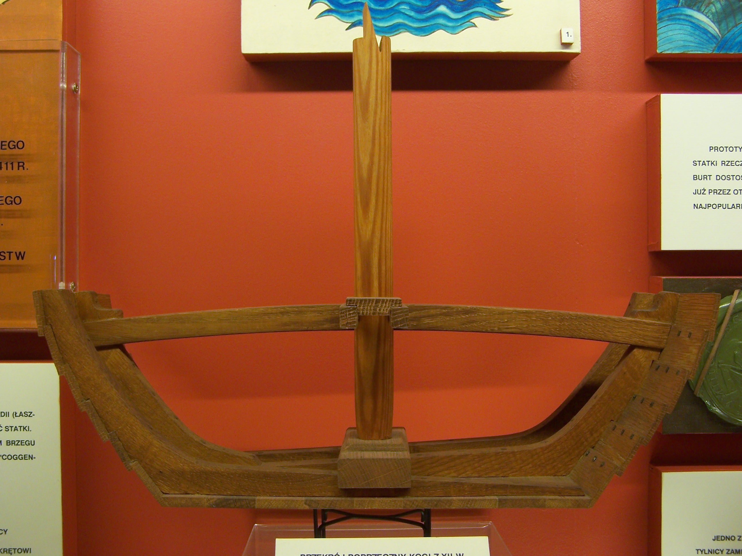 Przekrój poprzeczny kogi z XII w. odkrytej w Brugii (Belgia). Wyk. J.Piątkowski. Skala 1:10. Centralne Muzeum Morskie w Gdańsku.